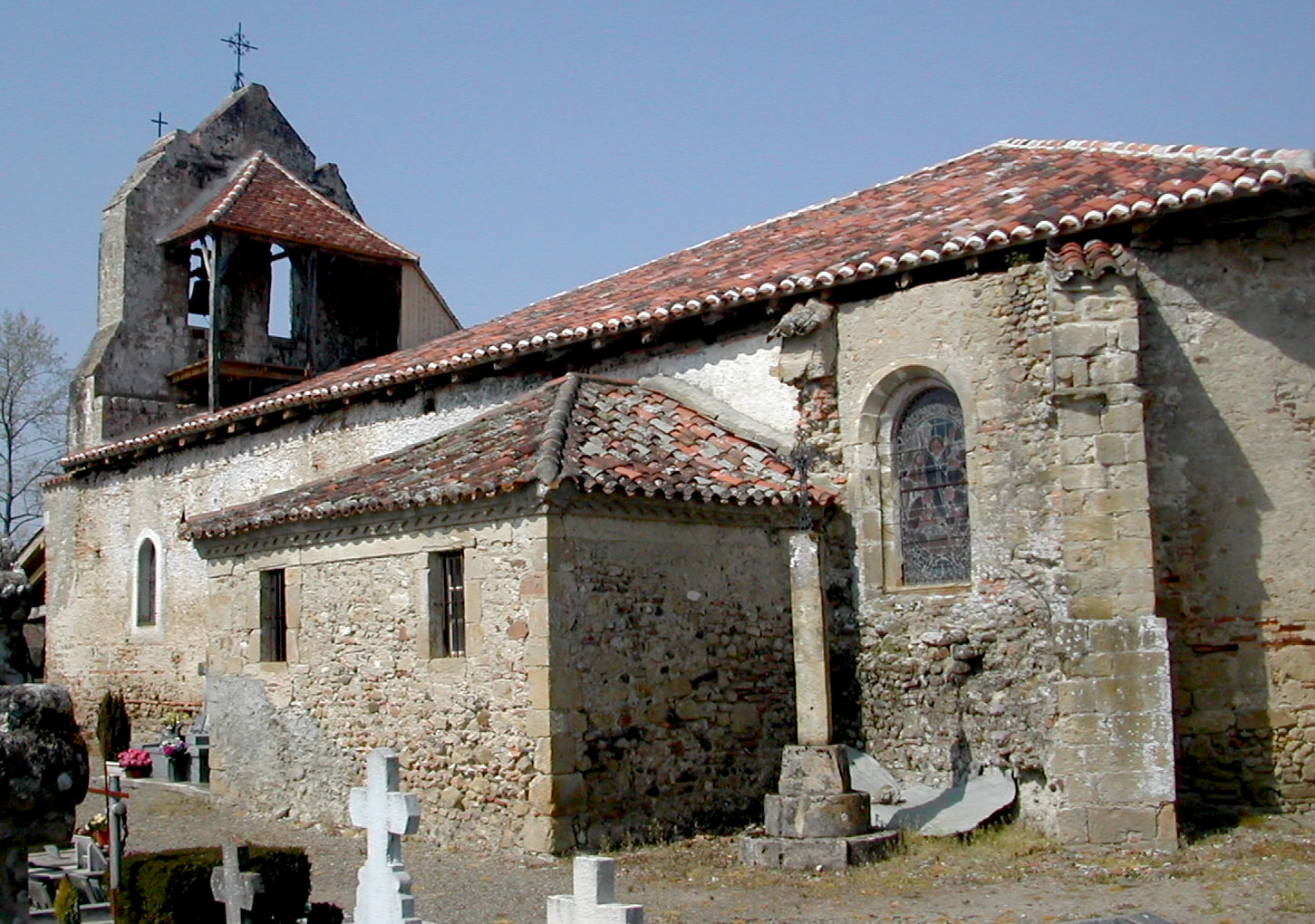 Église Saint-Sernin, Gée-Rivière